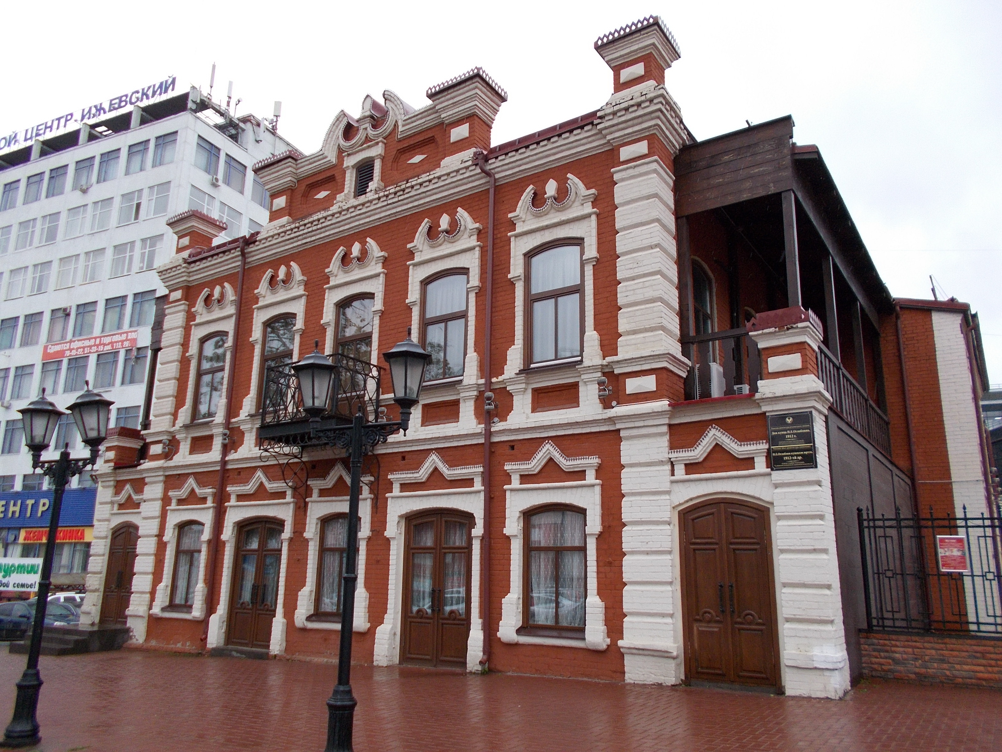 Дом купца Оглоблина, 1912 г., улица Красноармейская,129, Ижевск, Удмуртия